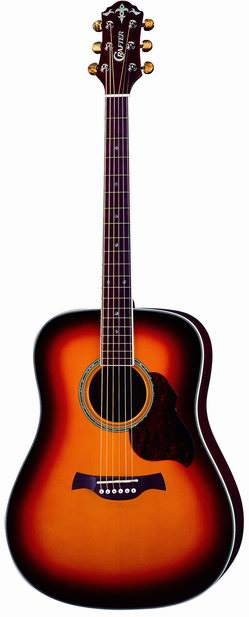 Гитара Crafter D-8/TS